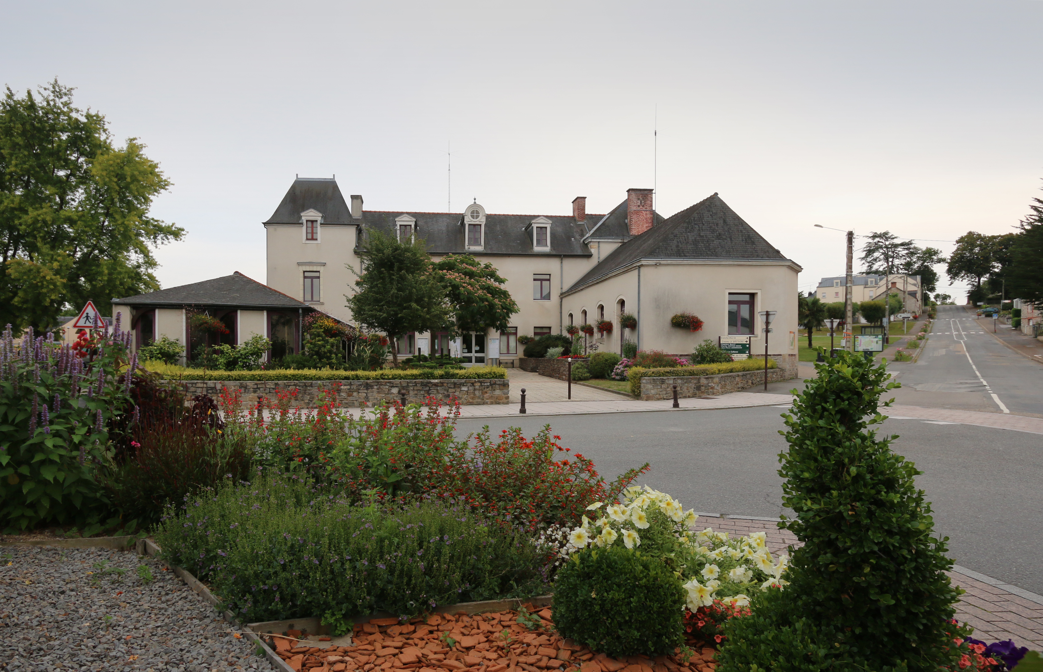 Mairie de Guichen